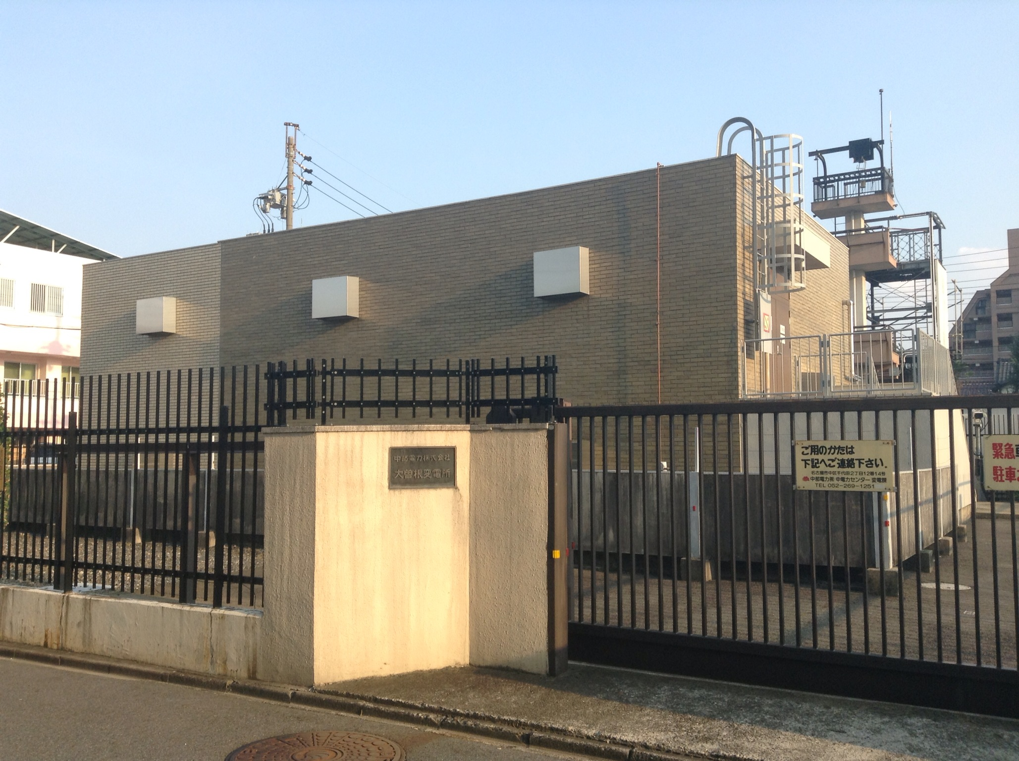 名古屋市北区芦辺町に所在する中部電力大曽根変電所を北側から写す